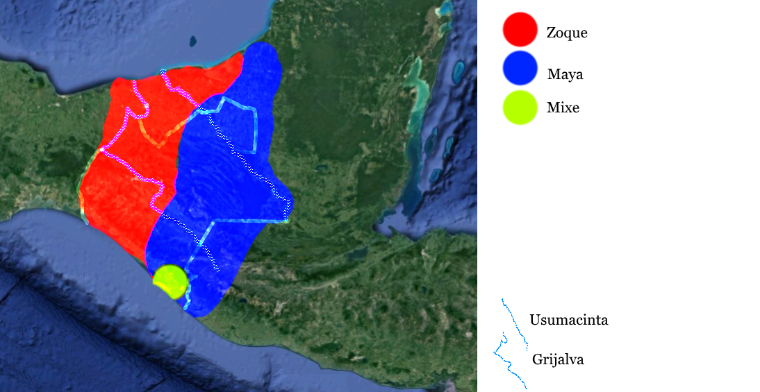 Distribución de lenguas en Chiapas a finales del Preclásico. En su forma general, prevaleció hasta finales del periodo Prehispánico salvo por la entrada de los chiapanecas en el Posclásico.